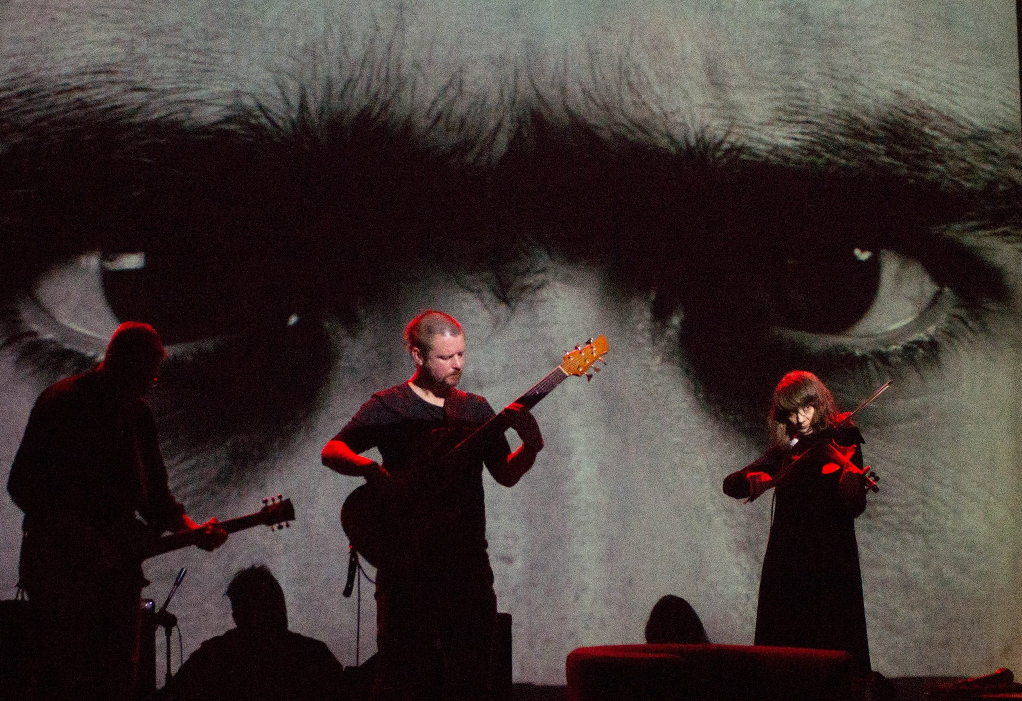 Zahlada w CPK